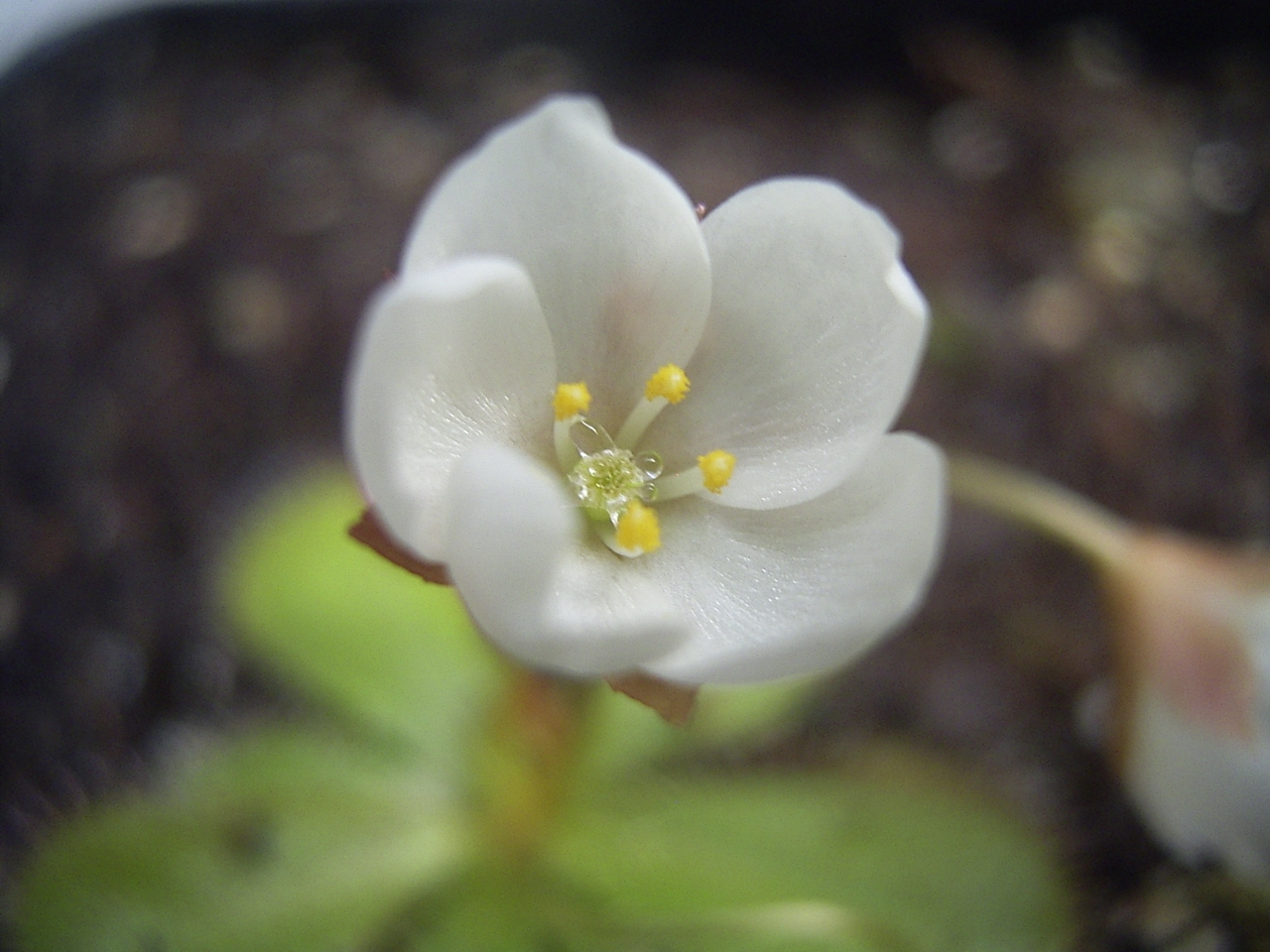 Drosera tubaestylus flora